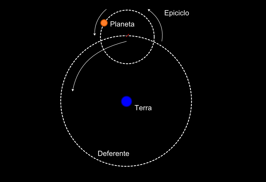 Descrição dos epiciclos de um planeta enquanto ele orbita a Terra, segundo a teoria de Ptolomeu.